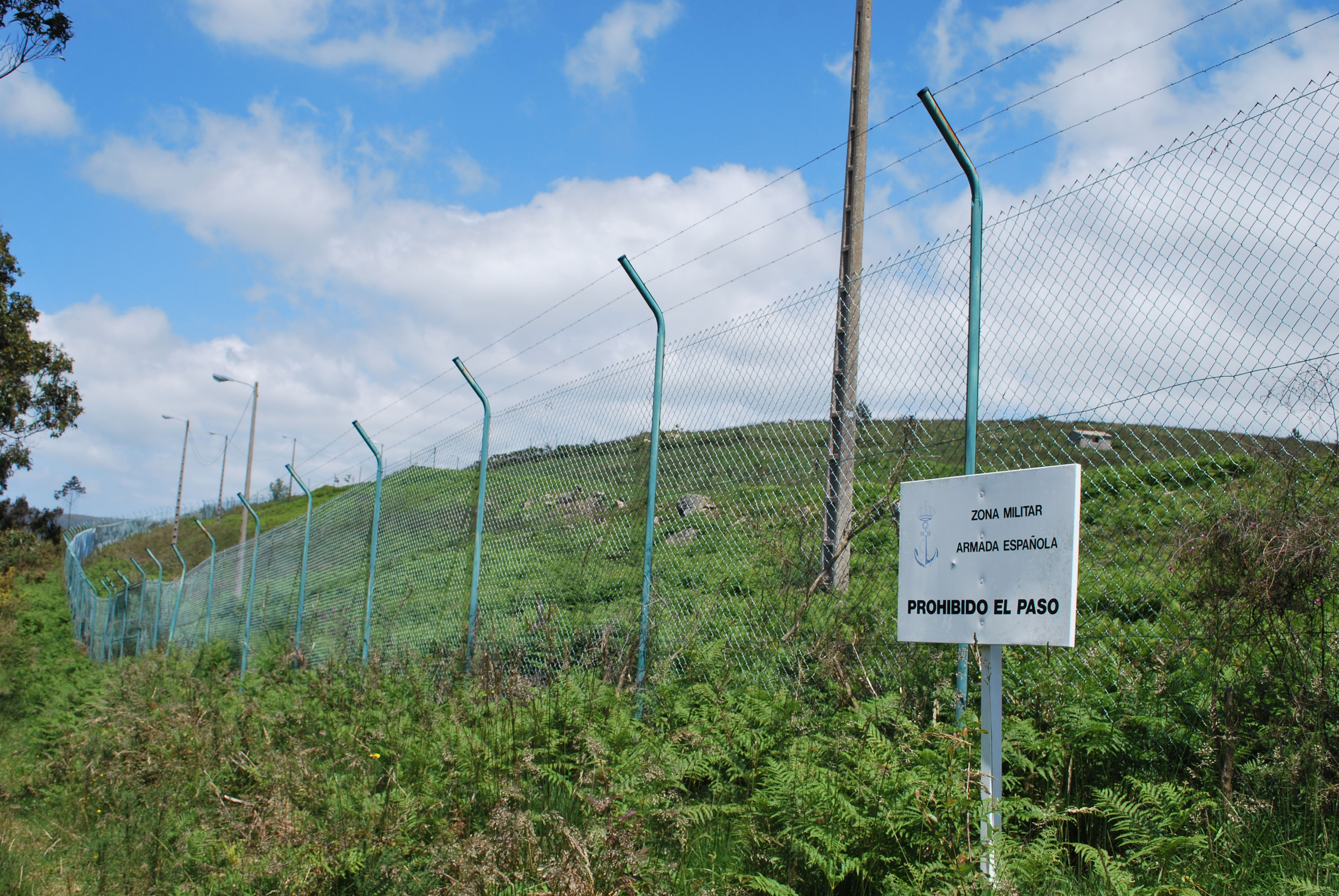 Valado do polvorín de Mougá en Ferrol, Armada Española A Coruña Galiza Spain